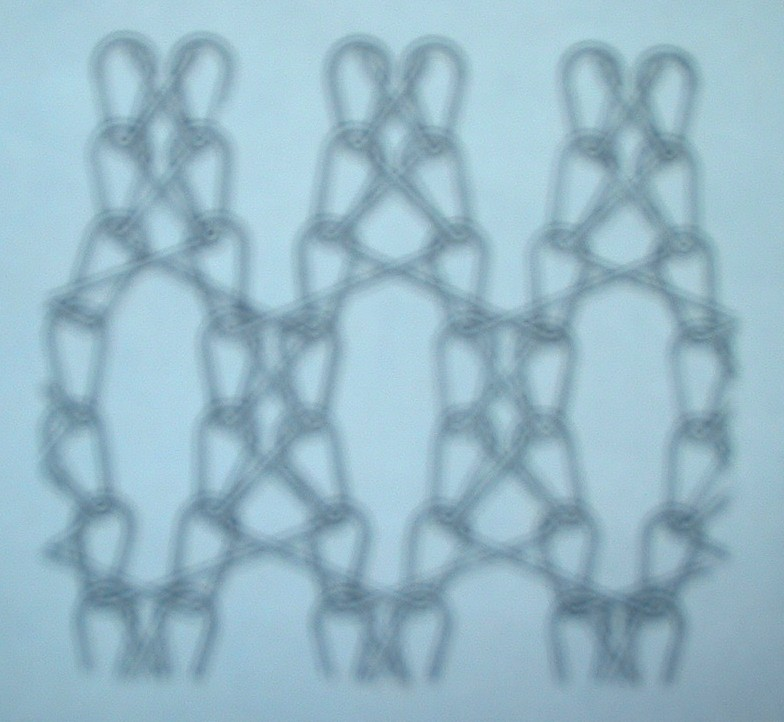 Schema:Filetbindung